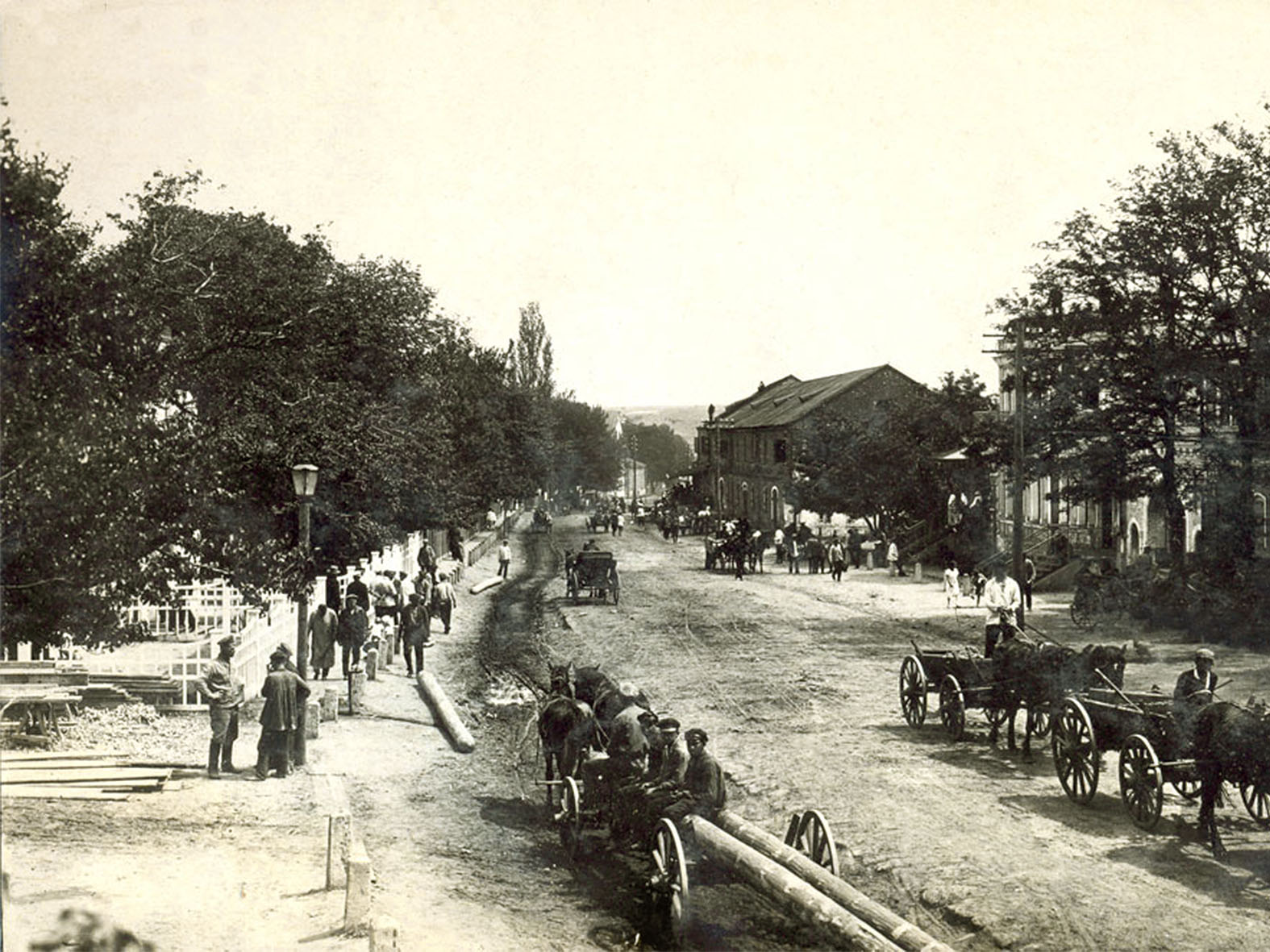 Центральна вулиця колонії Айнлаге-Кічкас перед затопленням у 1930-х роках